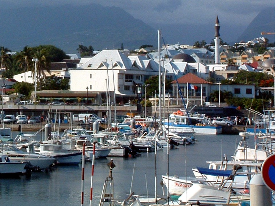 Saint-Pierre, La Réunion, viewed from the harbour, vue du port de plaisance